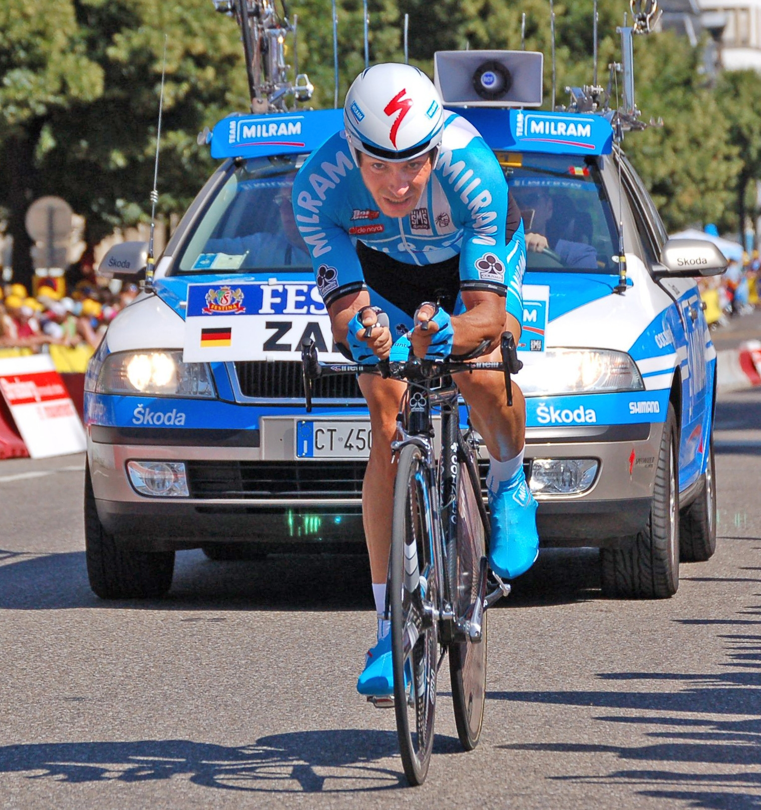 Tour de France, Prolog, Erik Zabel.